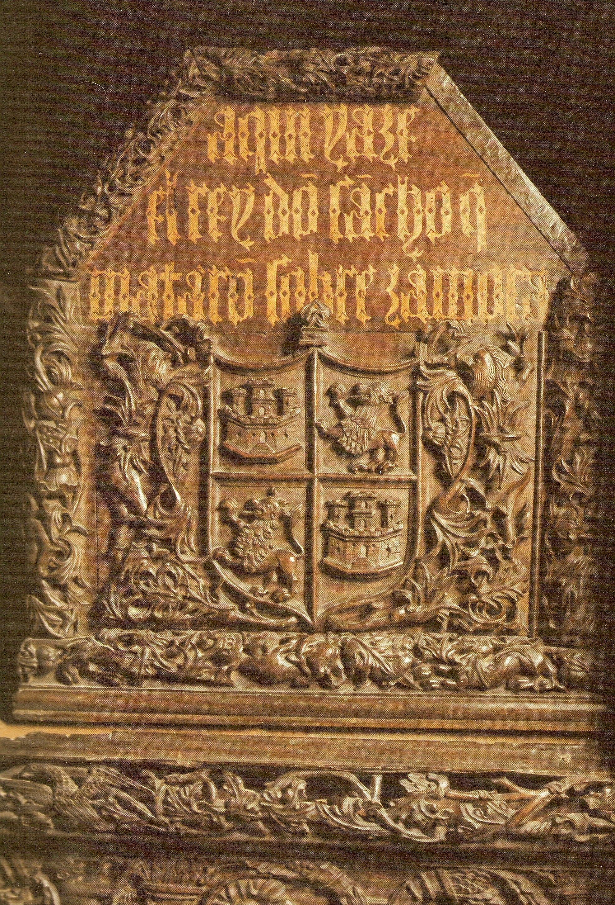 Frontal del sepulcro del rey Sancho II de Castilla (c.1038-1072). Monasterio de San Salvador de Oña (Burgos).